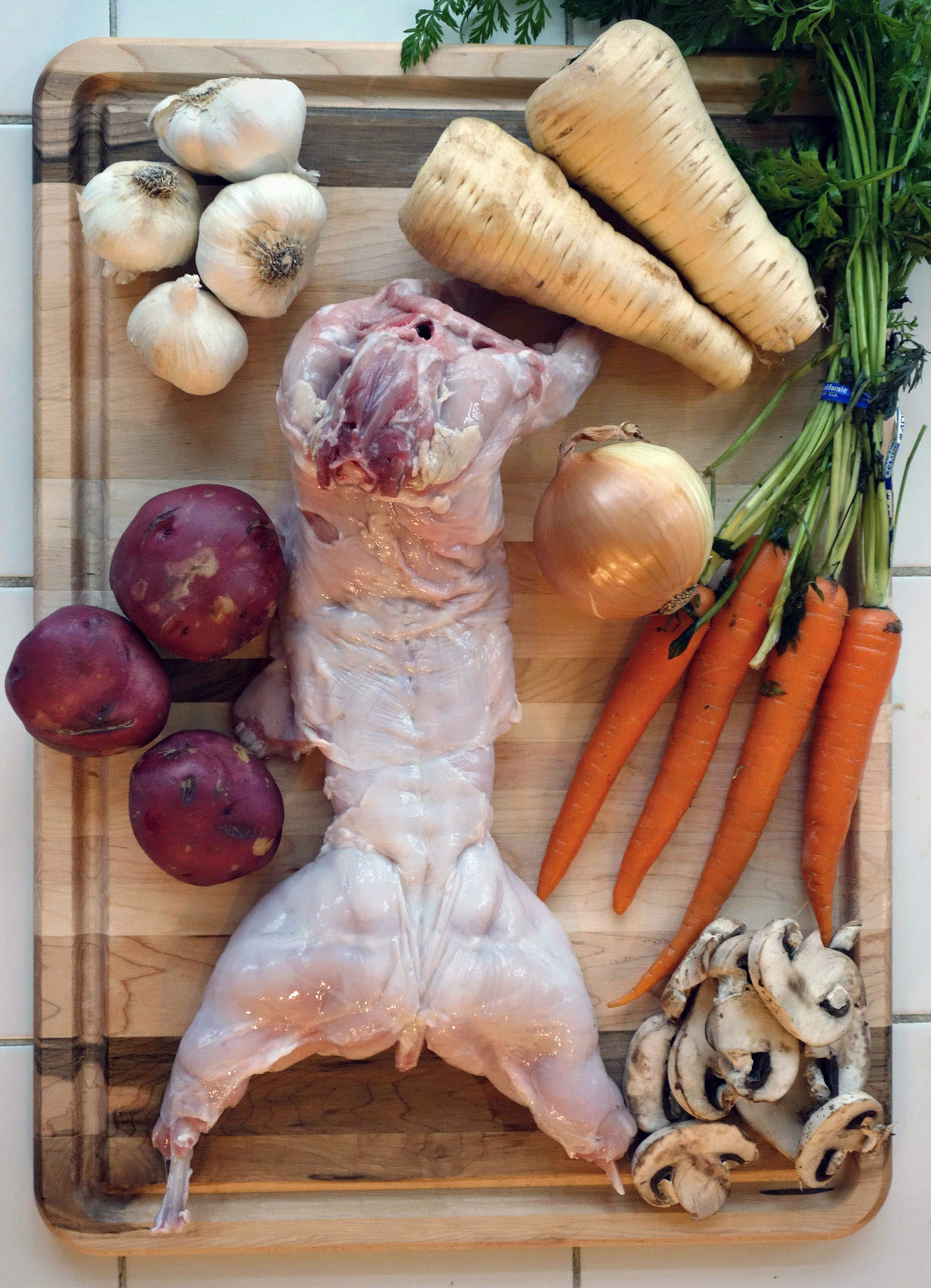 Rabbit stew ingredients